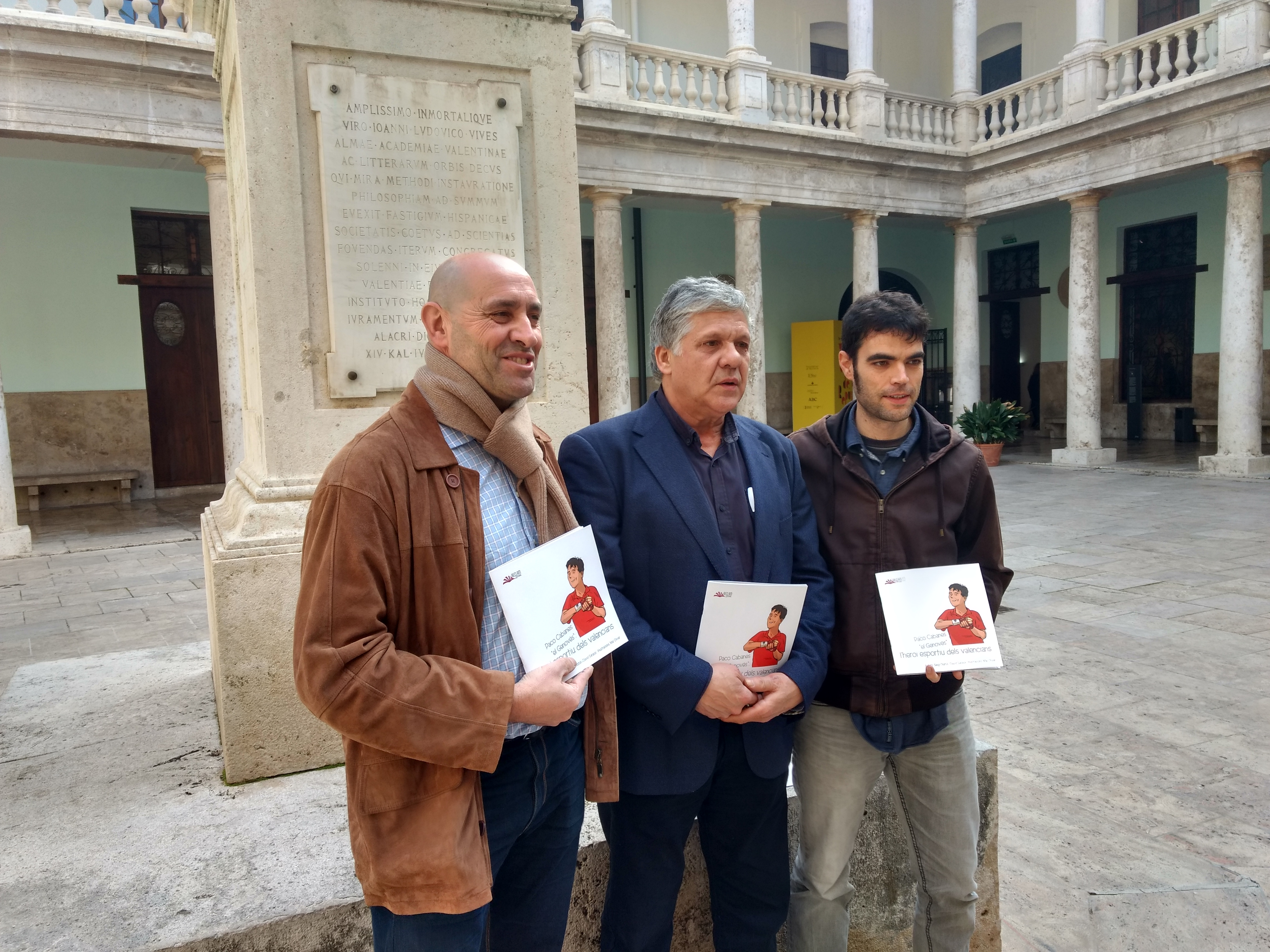 Paco Genovés amb els autors, Sergi Durbà i David Sarasol.